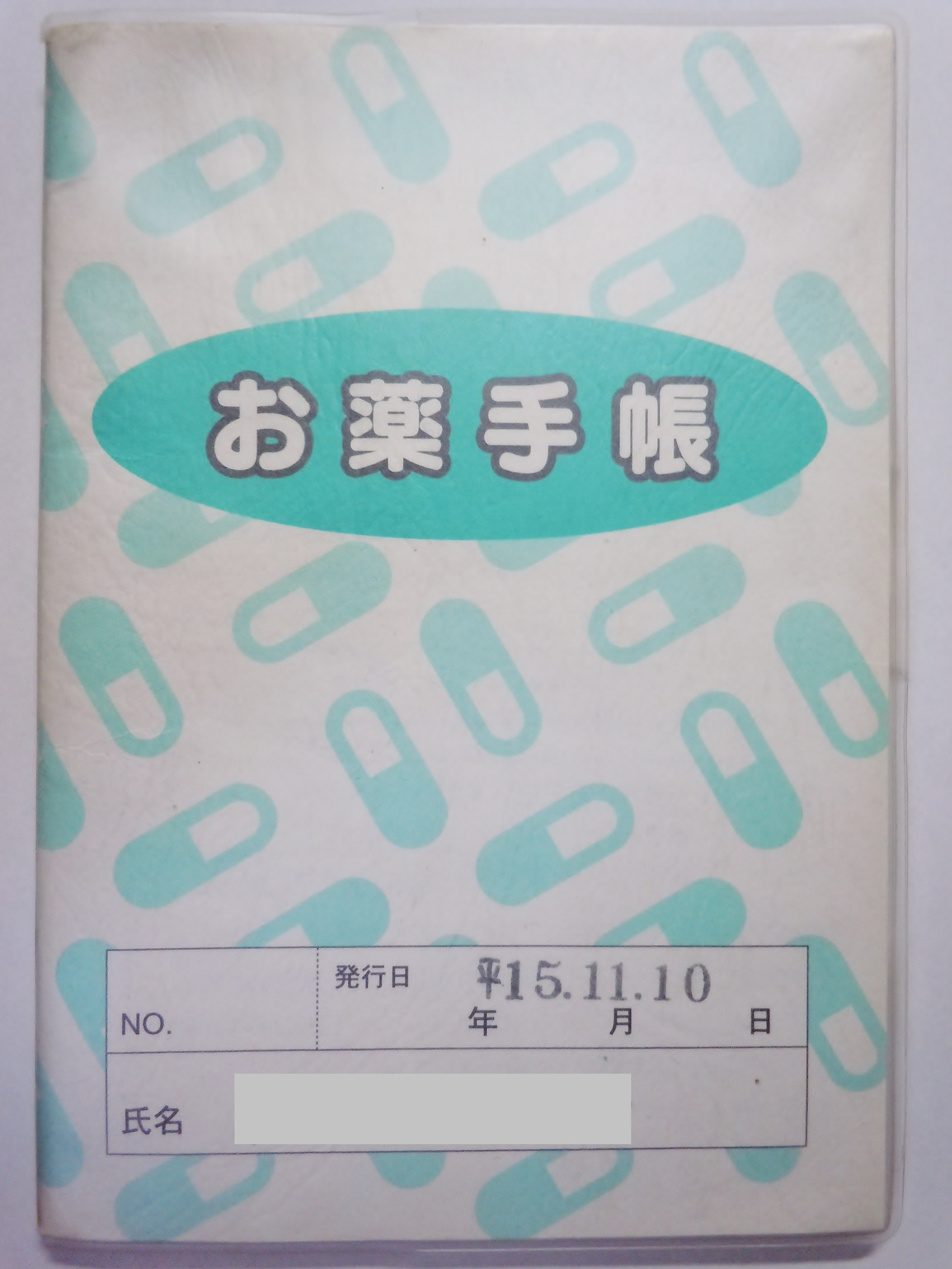 お薬手帳。ある程度使いこまれたもの。